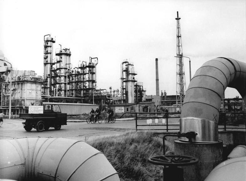 ADN-ZB-Reiche-10.8.71-hsch-Bezirk Frankfurt-Oder: VEB Petrolchemisches Kombinat, Stammbetrieb Schwedt - Werktätige der Raffinerie beseitigen Planrückstände. Blick auf die neue Parex - Anlage, die gegenwärtig im Probebetrieb läuft. Im sozialistischen Wettbewerb wollen die Werktätigen der Hauptabteilung Raffinerie die durch eine Havarie entstandenen Planrückstände kontinuierlich reduzieren. Die tägliche Einhaltung der Betriebsparameter ist oberstes Gebot im soziaistischen Wettbewerb. Zu den Wettbewerbszielen zählen ferner die Unterbietung der vorgegebenen Kosten, die Einsparung von Energie und Hilfsstoffen und die Erfüllung der industriellen Warenproduktion. Die Brigaden der Hauptabteilung Raffinerie werden täglich über den Stand der Planerfüllung informiert. (Siehe auch Foto Nr. K0810-2N)